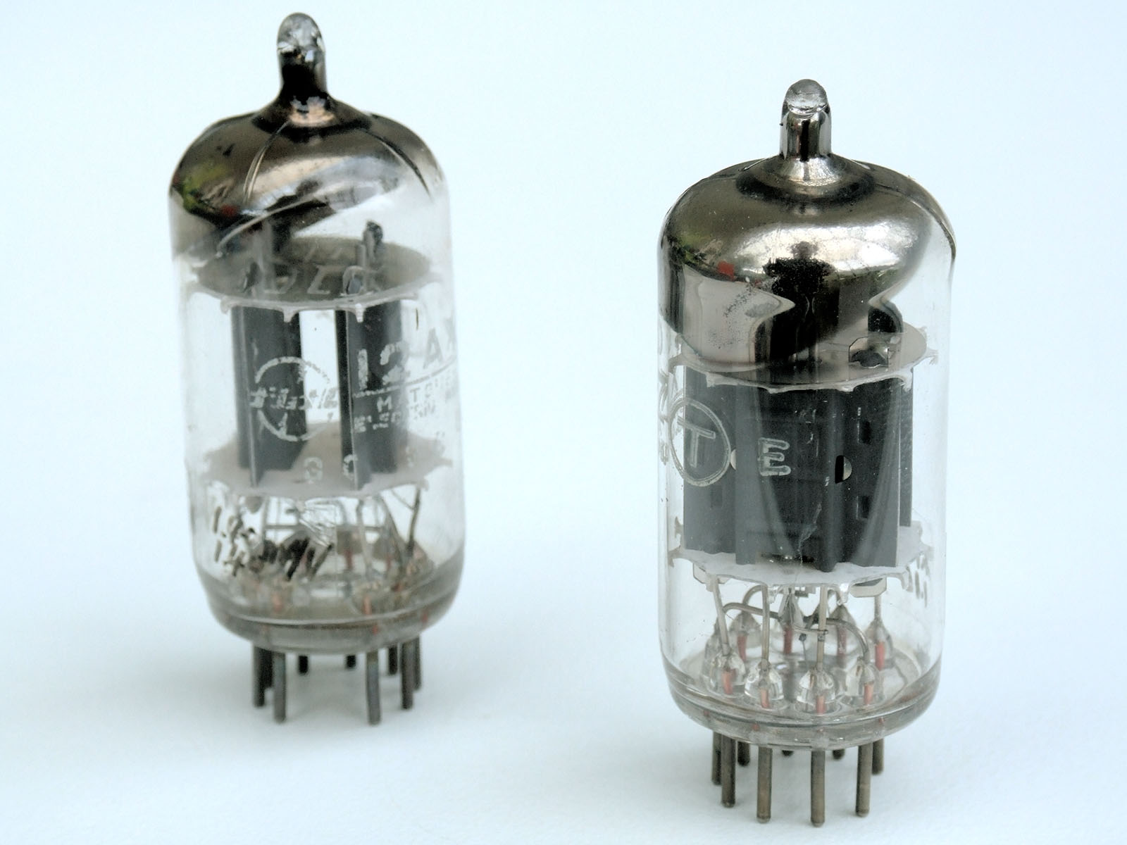 12AX7 Matsushitas, très semblables aux Mullards, fabriquées au Japon sur une chaine montée par Mullard.